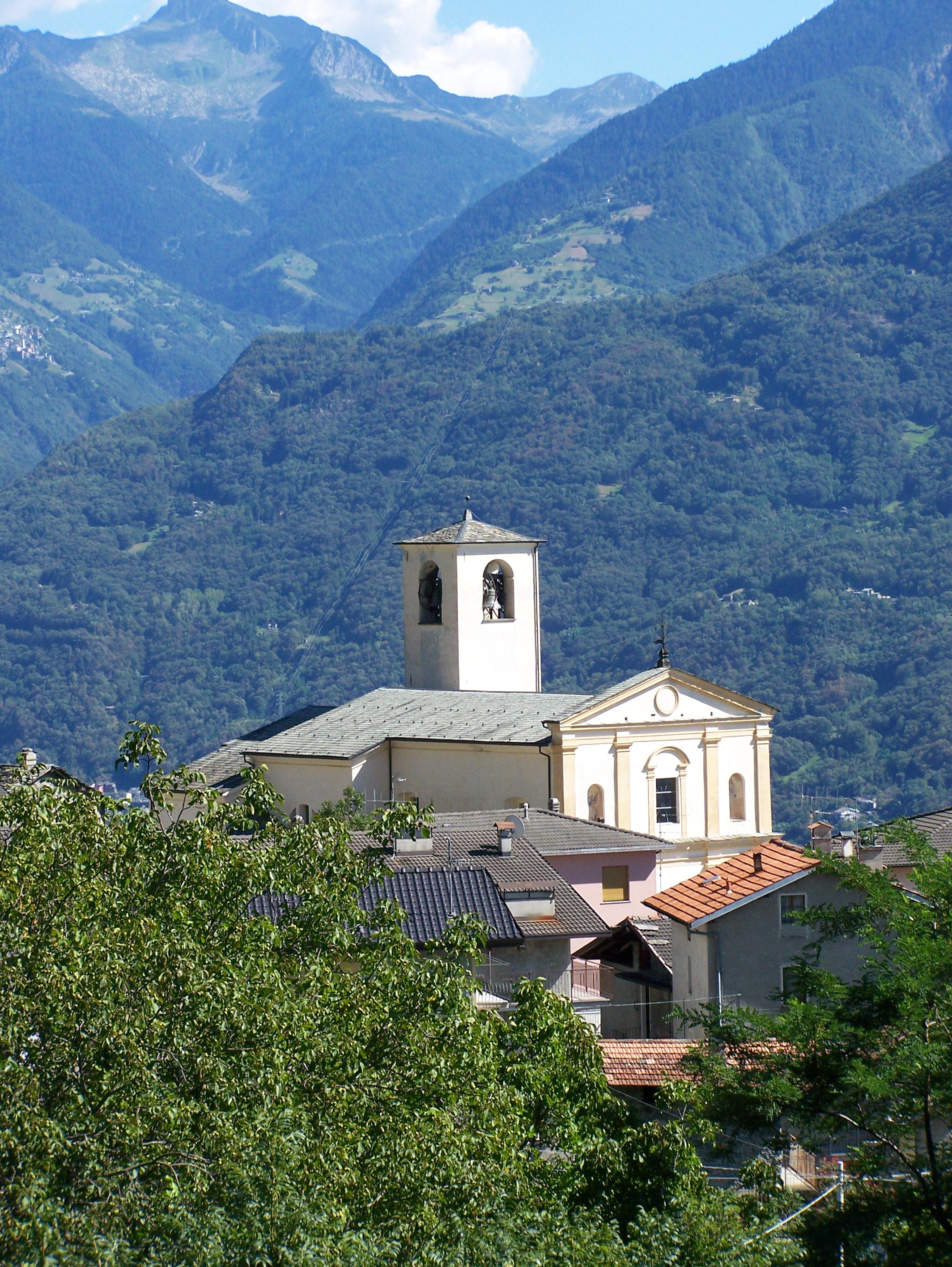 Panorama della chiesa di Cercino (SO) dal locale cimitero